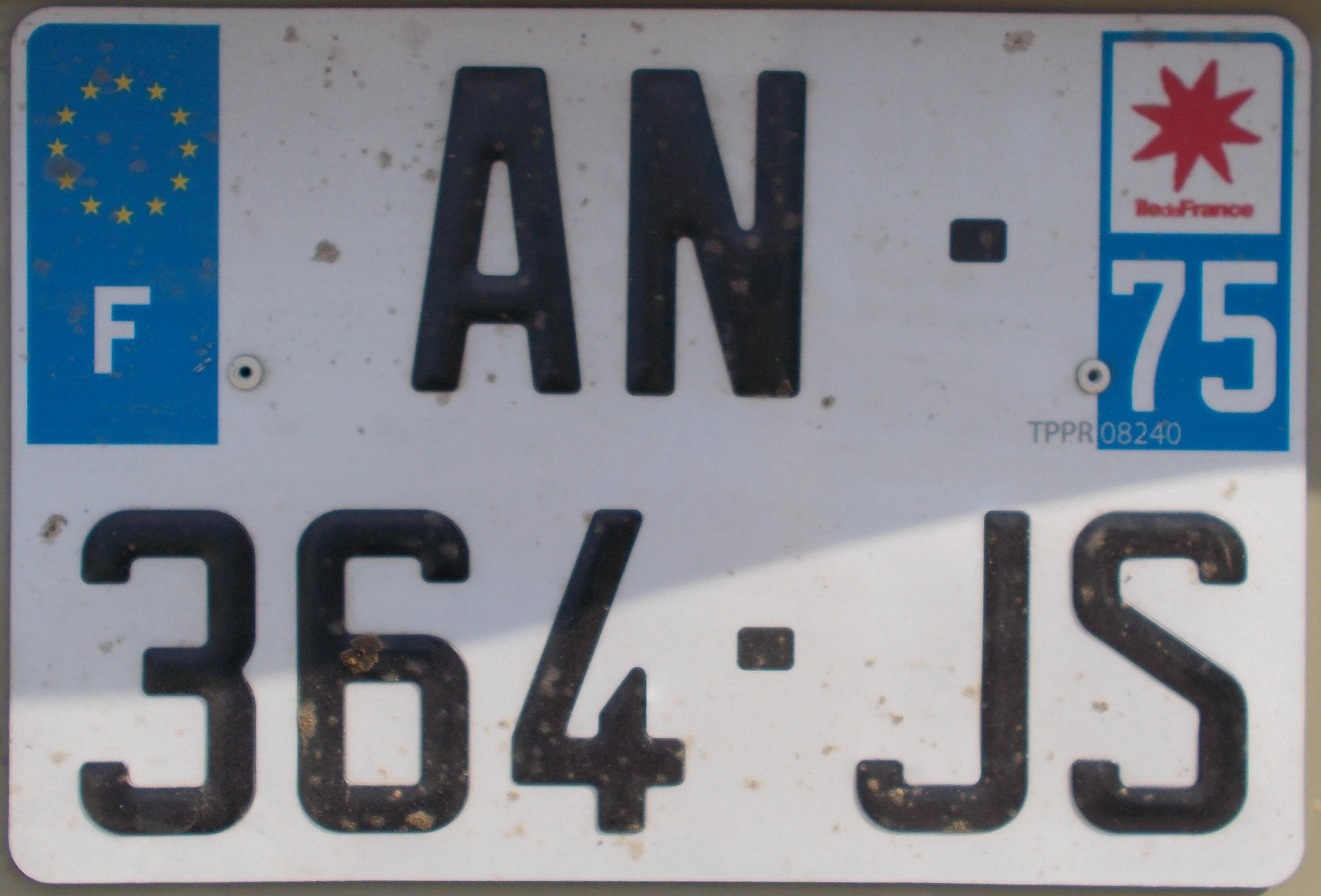 Номерний знак